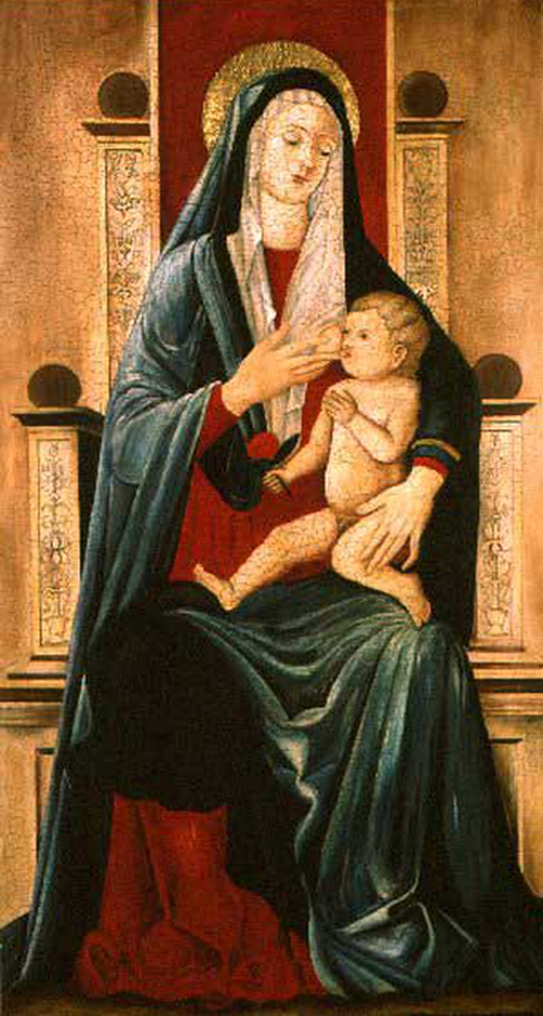 Bogorodica s djetetom, Juraj Ćulinović XV st., Šibenik, Samostan Sv. Lovre